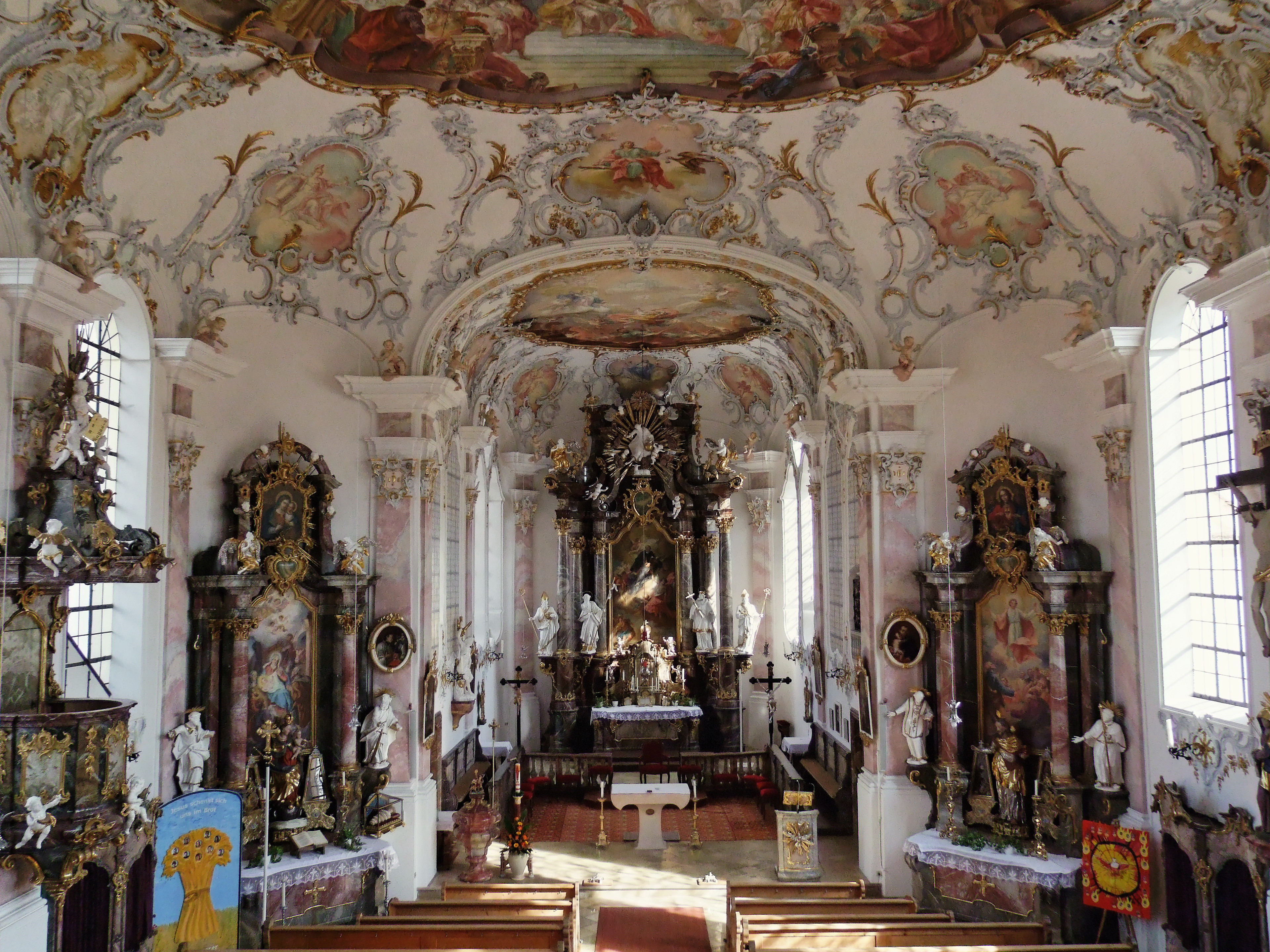 St. Magnus in Unterrammingen in Oberschwaben